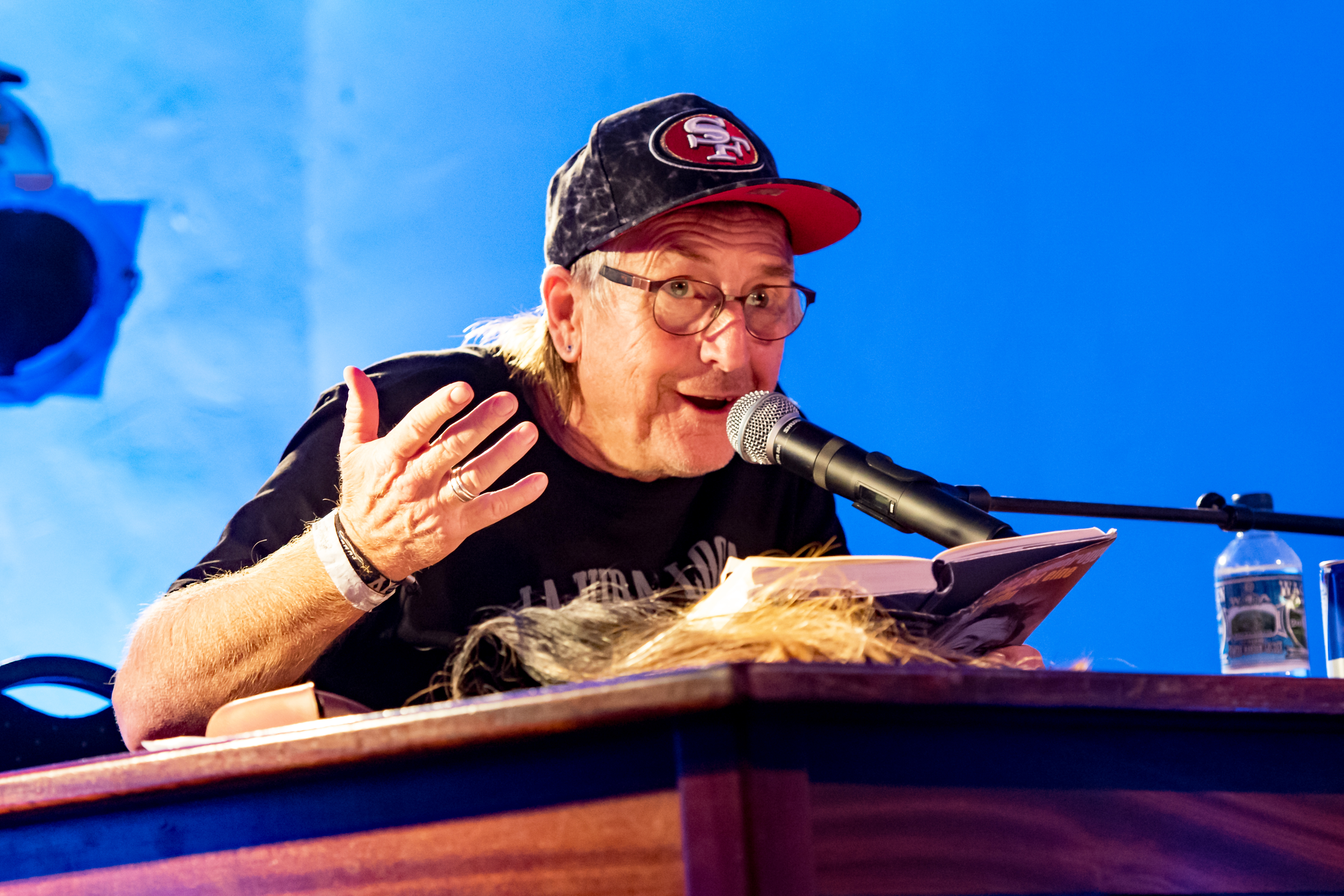 Martin Semelrogge bei einer Lesung im Zum Wackinger bei den Wacken Winter Nights 2017